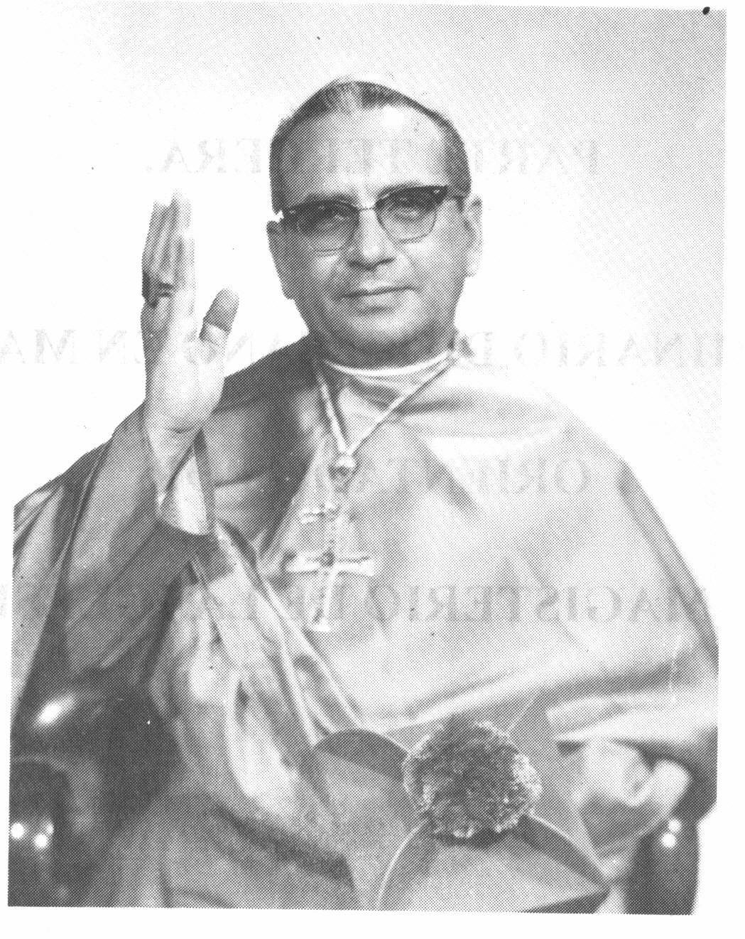 Monseñor Everardo López Alcocer